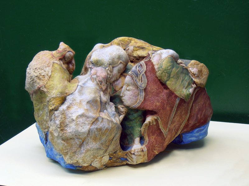 Some of the Animals that Did Not Get on the Ark B - 29x19x17 - 2010